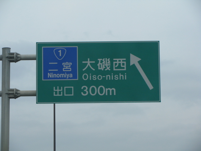 2009年4月1日、大磯西IC付近で撮影